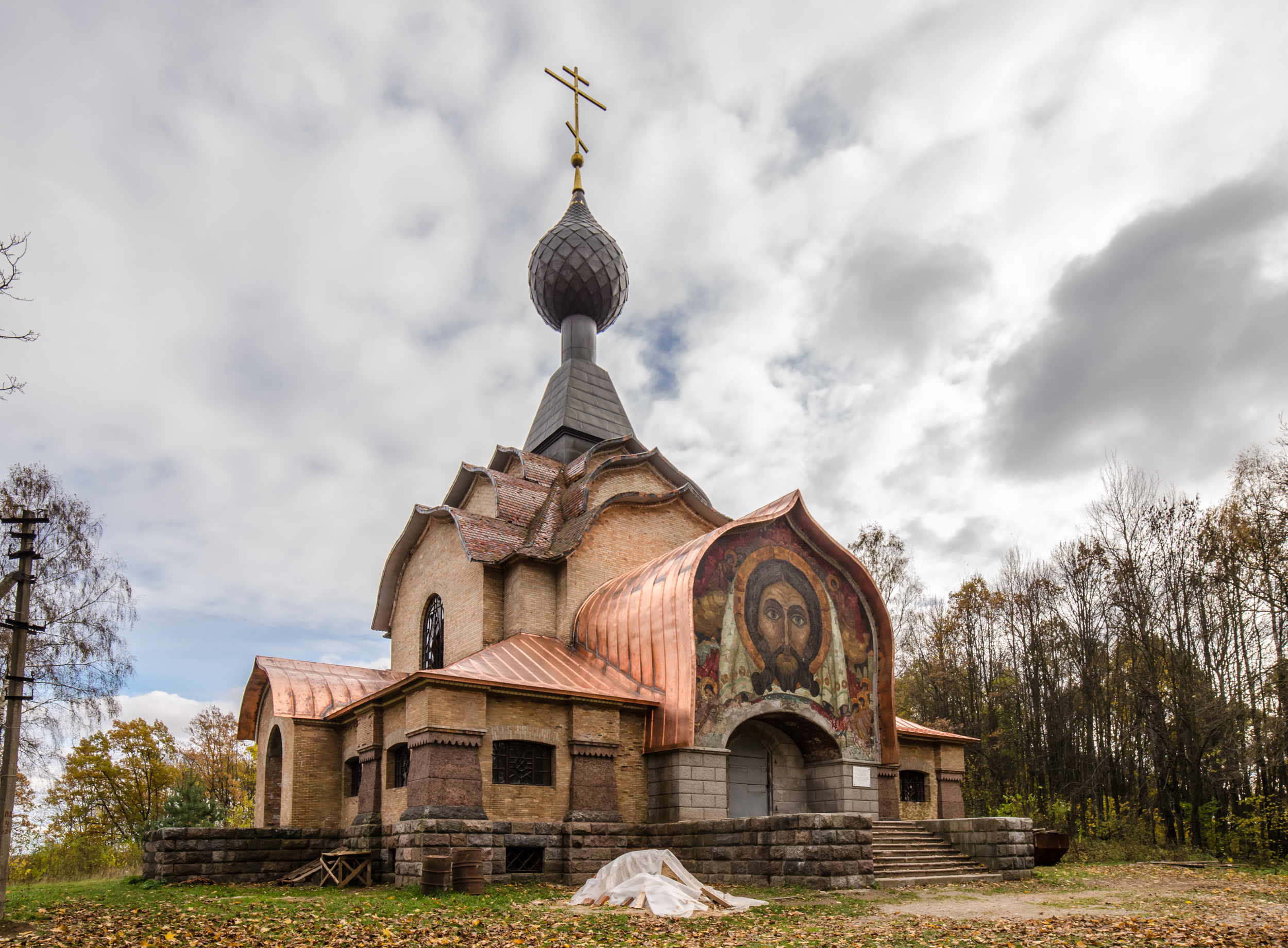 Церковь Сошествия Святого Духа: с. Фленово, Талашкино, Смоленский район, Смоленская область